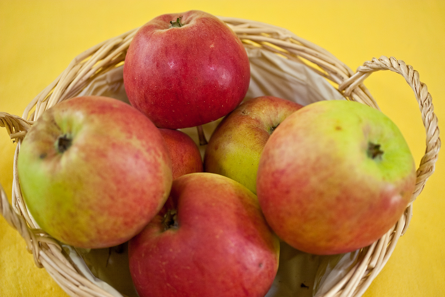 Der Erwin_Baur ist eine Apfelsorte